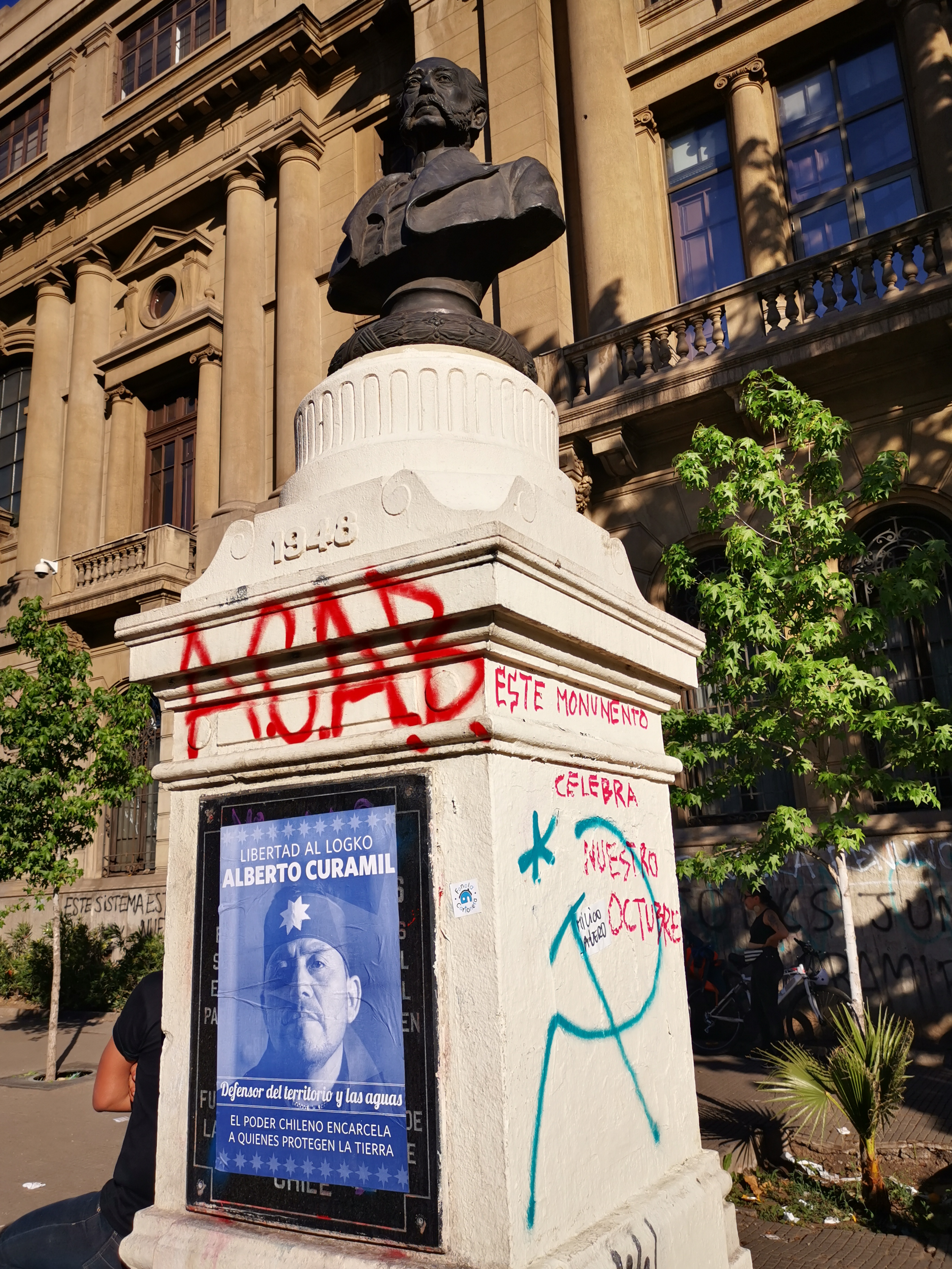 Protestas en la Alameda de Santiago, a la altura del Cerro Santa Lucía, el 21 de octubre de 2019.